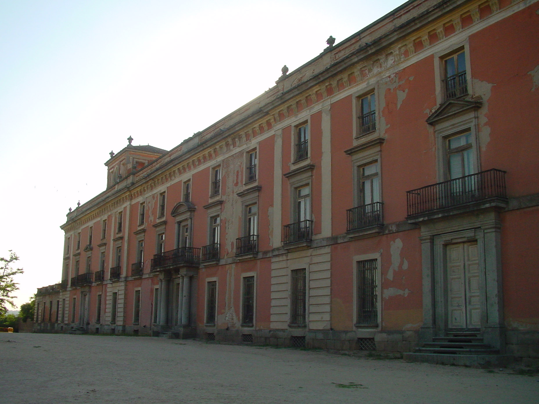 Palacio del Infante don Luis en Boadilla del Monte.